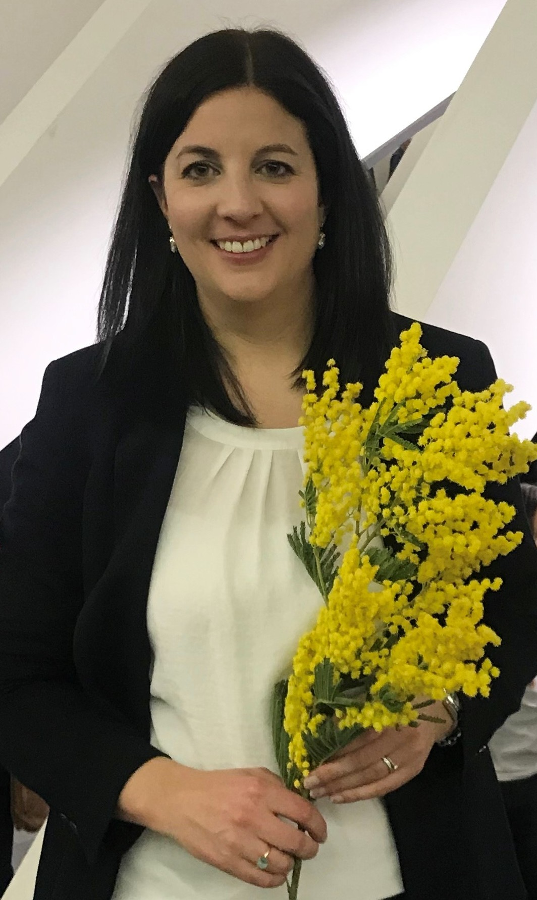 Bucher im kantonalen Wahlzentrum nach dem ersten Wahlgang der Wahlen am 8. März 2020.